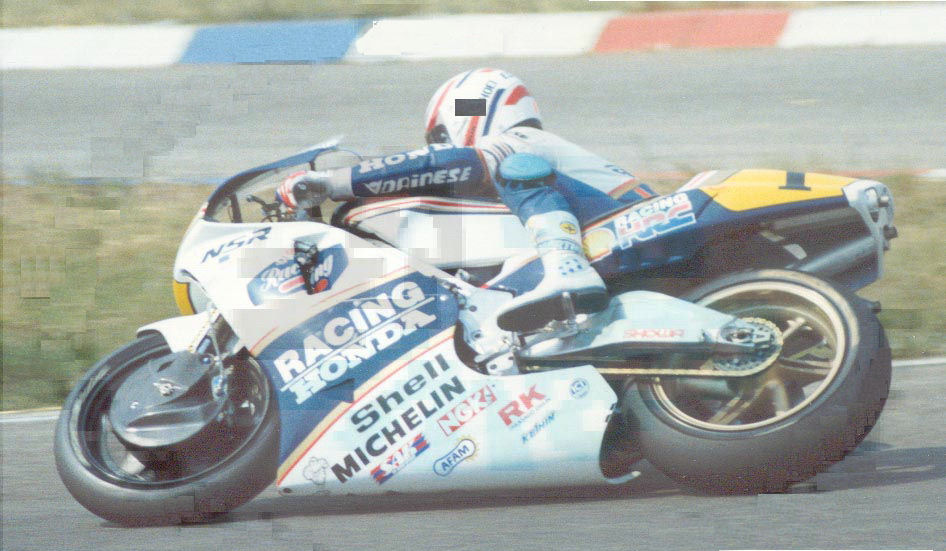 Eddie Lawson